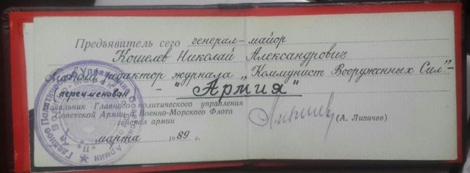 Удостоверение